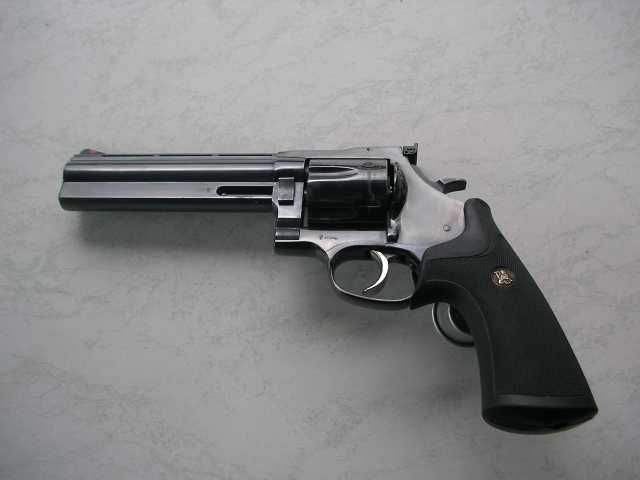 Dan Wesson Revolver Model 44